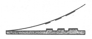 Scéma tisku z výšky